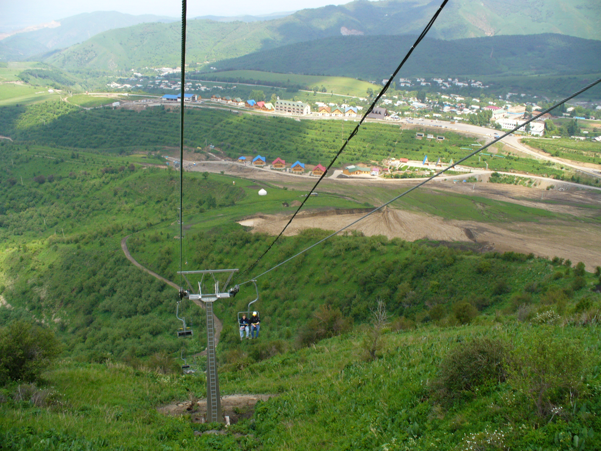 Вид на комплекс Табаган с канатной дороги